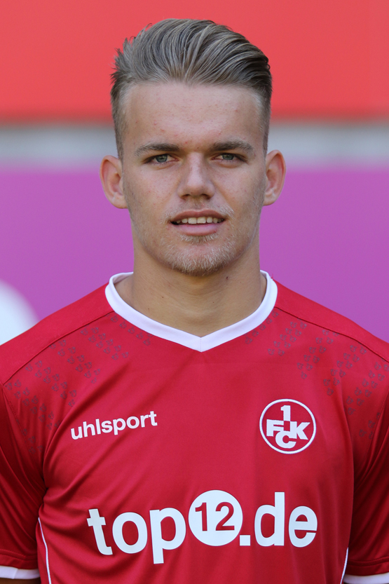 Niklas Shipnoski